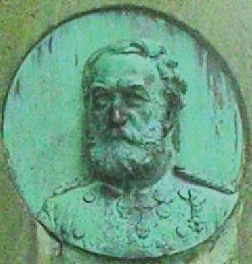 Bronzeplatte von Otto Vaupell in seinem Gedenkstein vor dem Schloss Koldinghus in Kolding